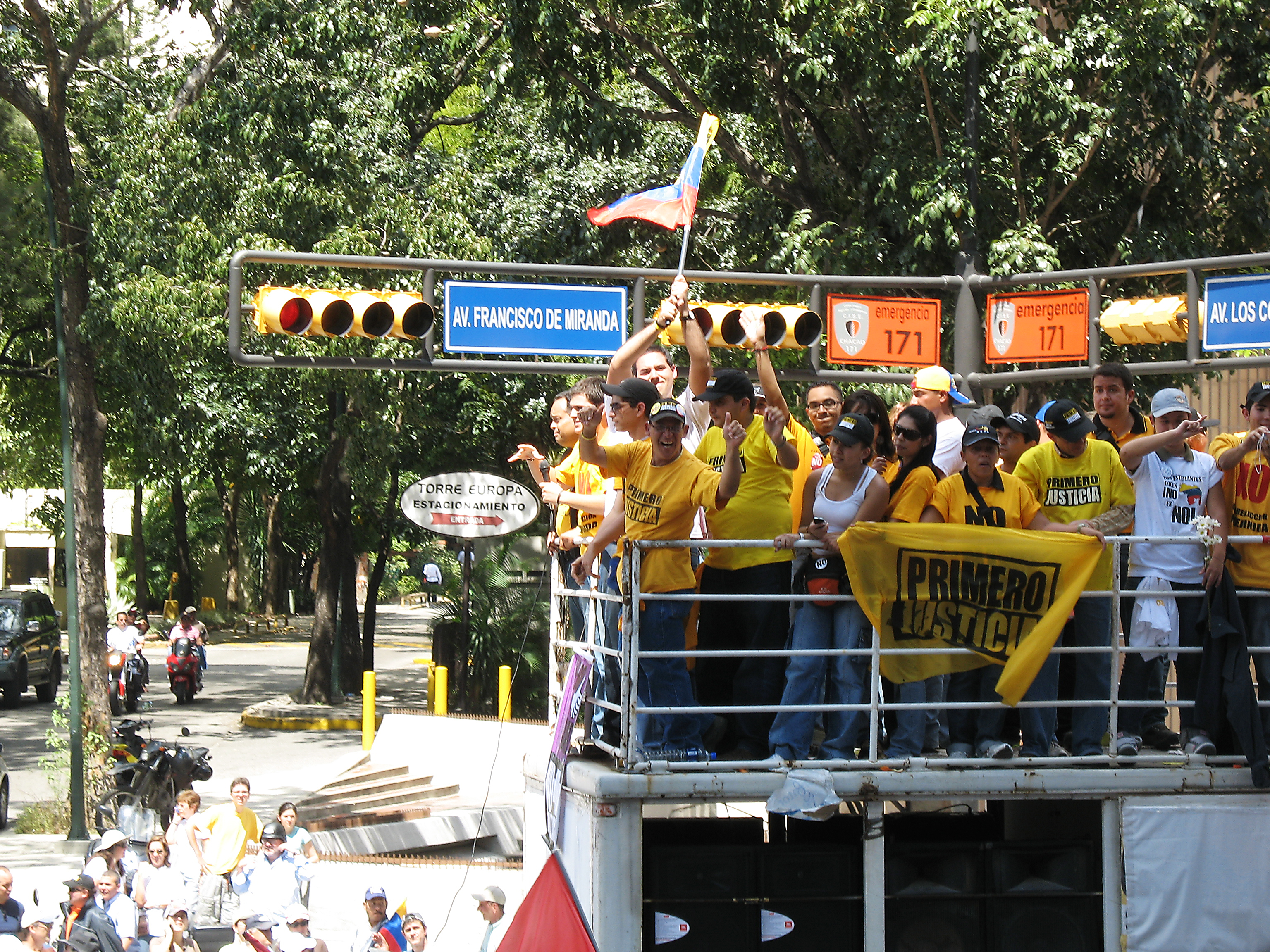 El líder estudiantil Yon Goicoechea en una manifestación de Primero Justicia (2007).